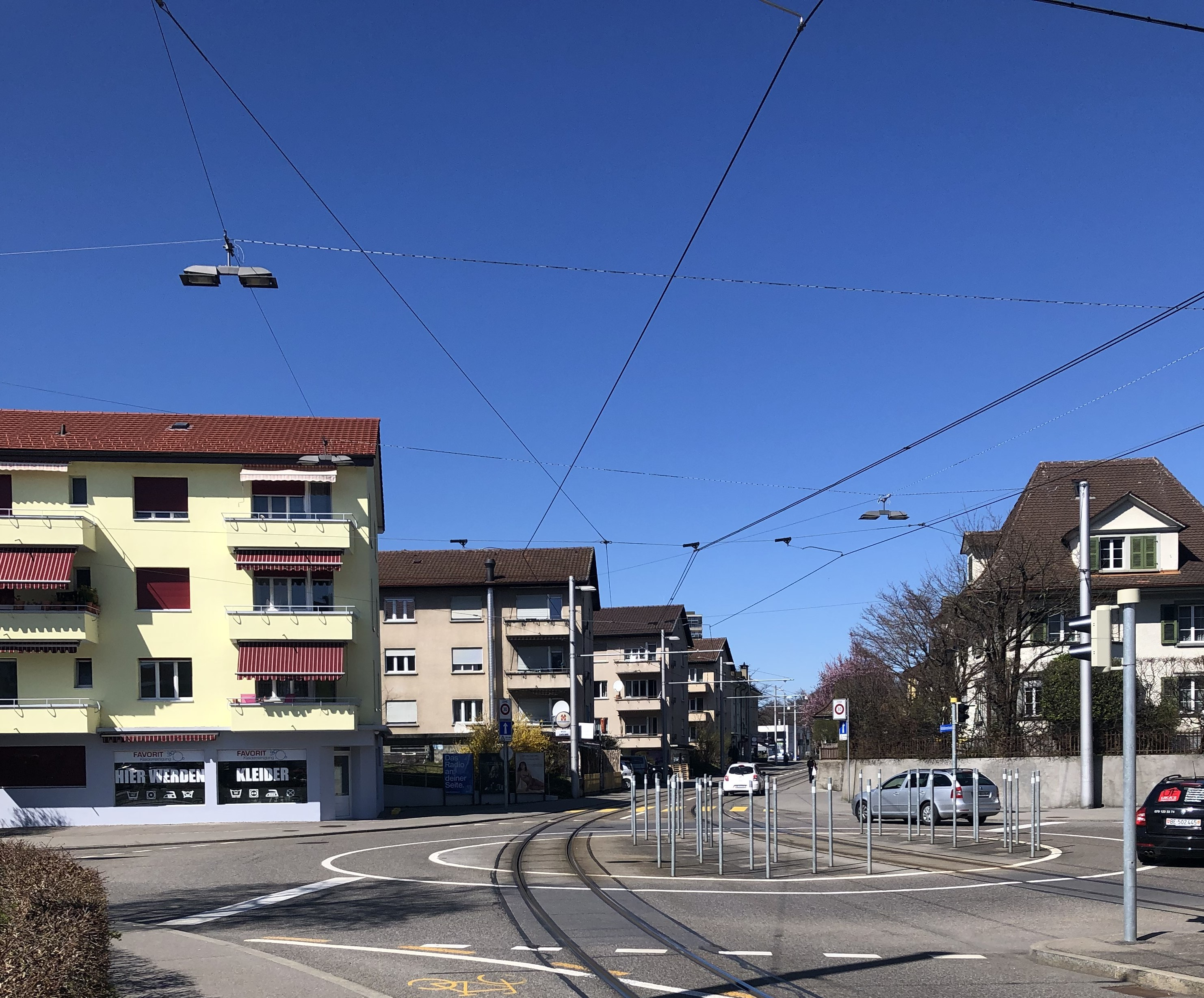 Blumenfeld nortwestliche Grenze (links)